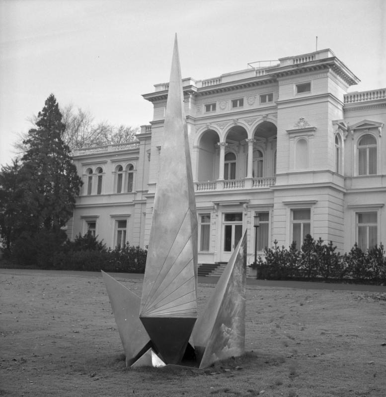 Plastik "Erektion" von Volkmar Haase im Garten vor der Villa Hammerschmidt